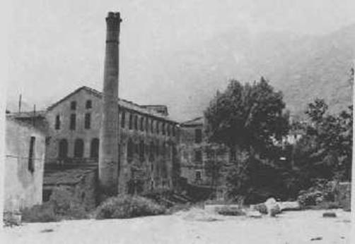 Stabilimento industriale Buonanno a Solofra (AV)